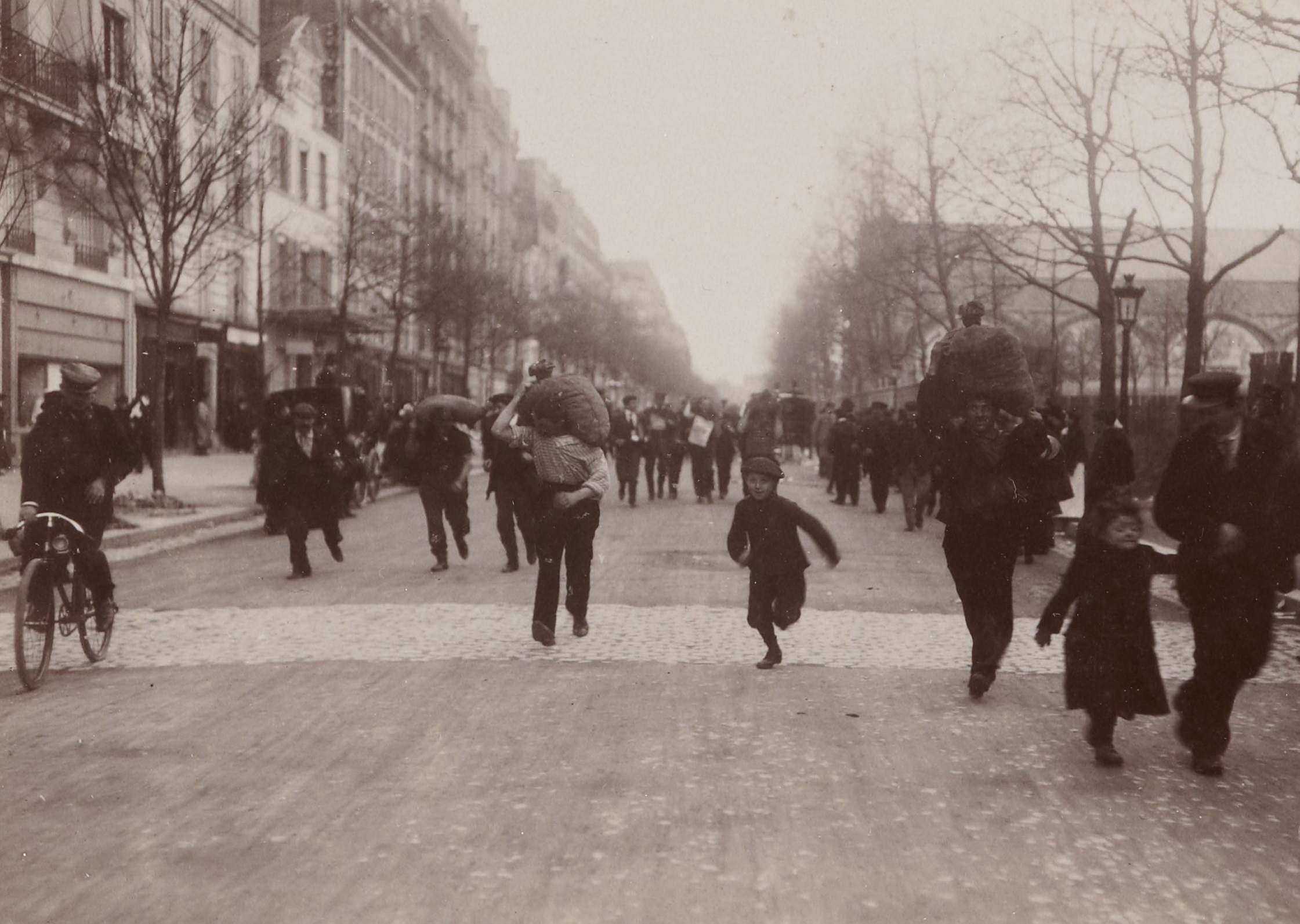 [Collection Jules Beau. Photographie sportive] : T. 24. AnnÃ©es 1903 et 1904 / Jules Beau : F. 50v. [Course des Charbonniers, organisÃ©e par le Club AthlÃ©tique du Champ de Mars, sous le patronage du Monde Sportif, 14 fÃ©vrier 1904]